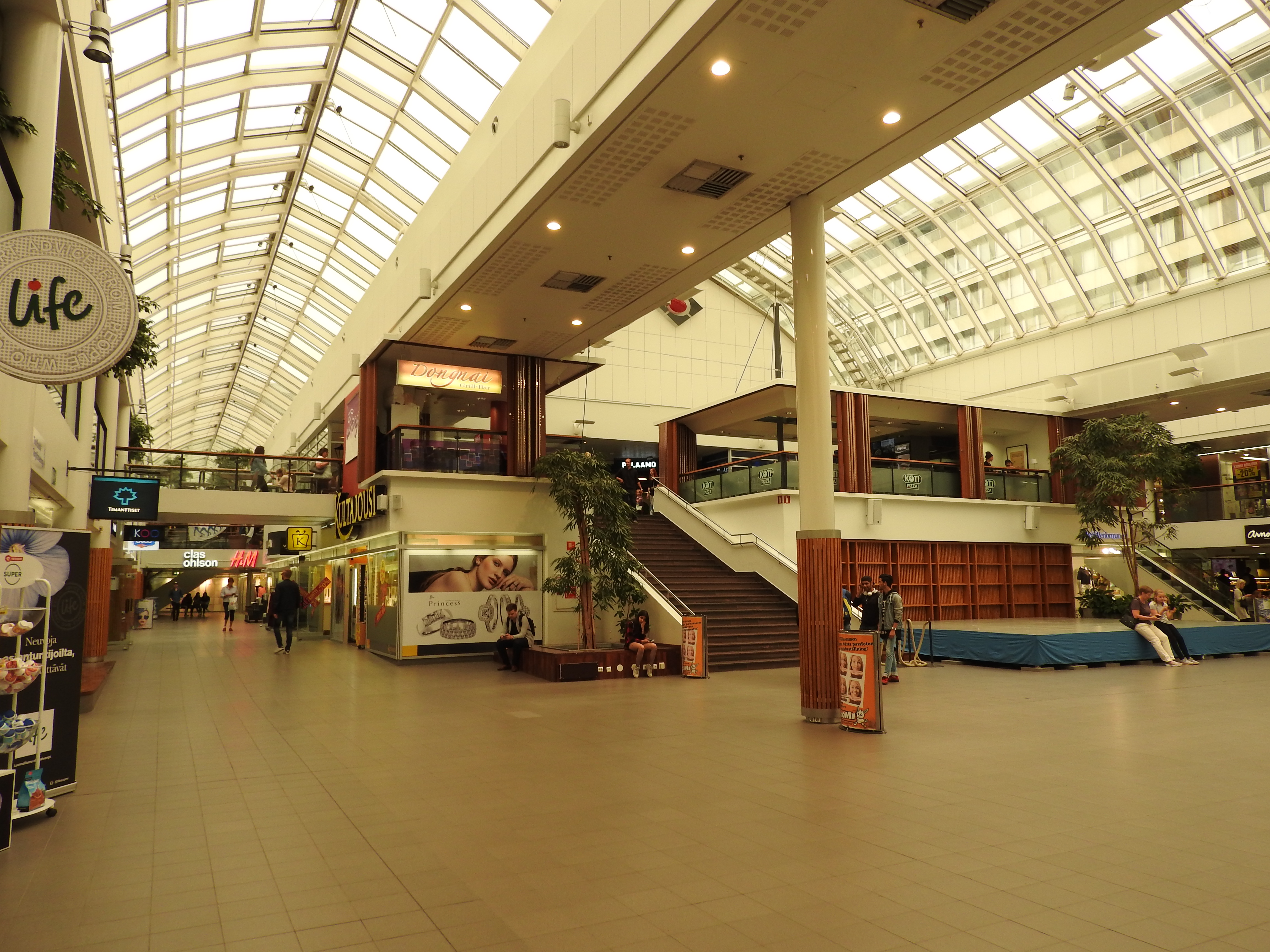 Näkymää Vaasan Rewell Centeristä sisältä vuonna 2017